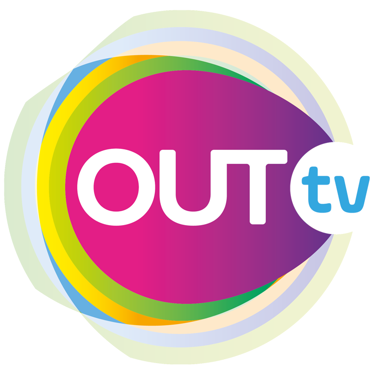 logo outtv